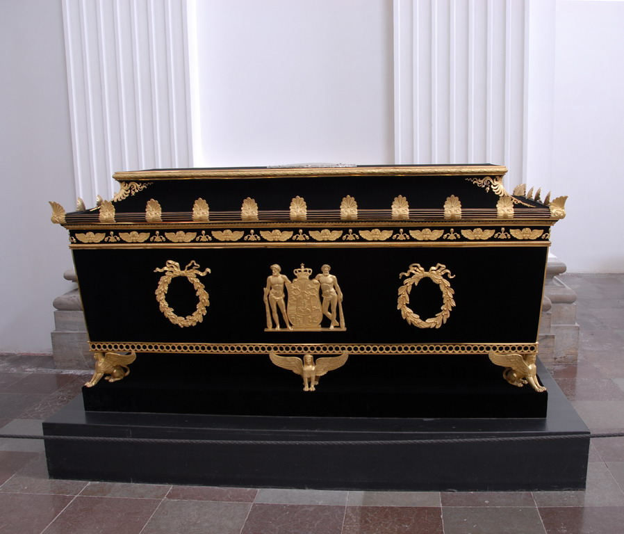 Grava til dronning Marie Sophie Frederikke av Danmark. Dronning: 1808-1839. Levde: 28. oktober 1767–31. mars 1852. Sarkofagen står i Roskilde domkyrkje.